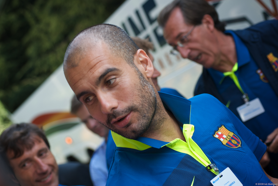 Josep Guardiola